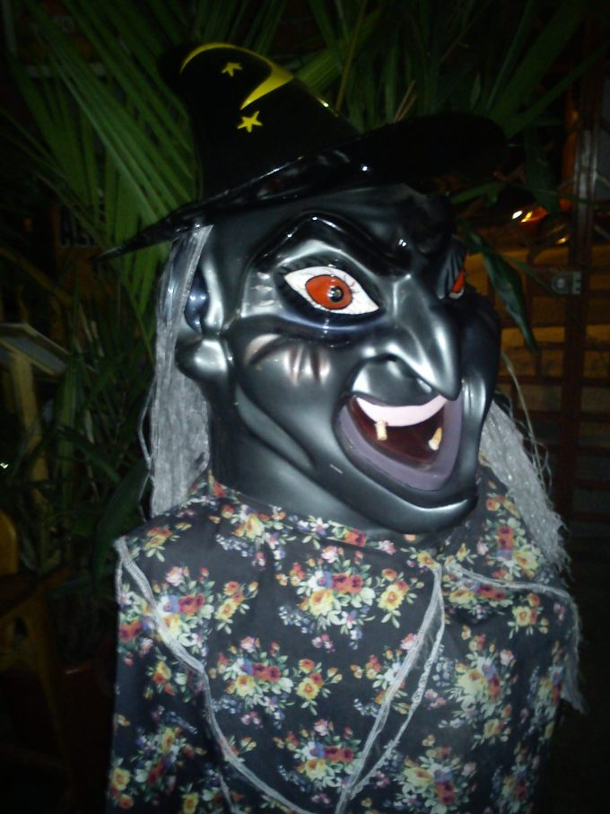 Máscara artesanal costarricense representando a una bruja. Aserrí, Costa Rica.